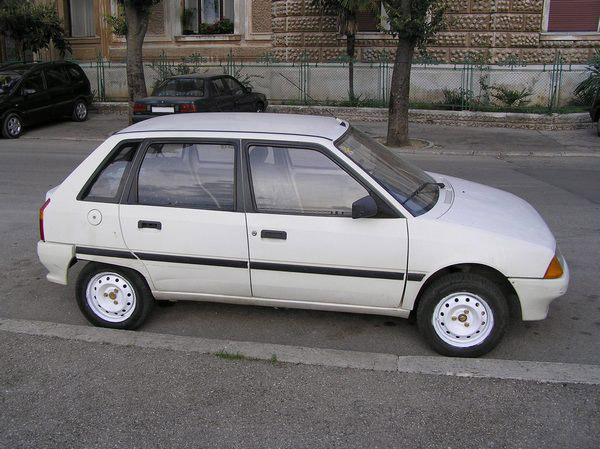 Citroen AX self-made